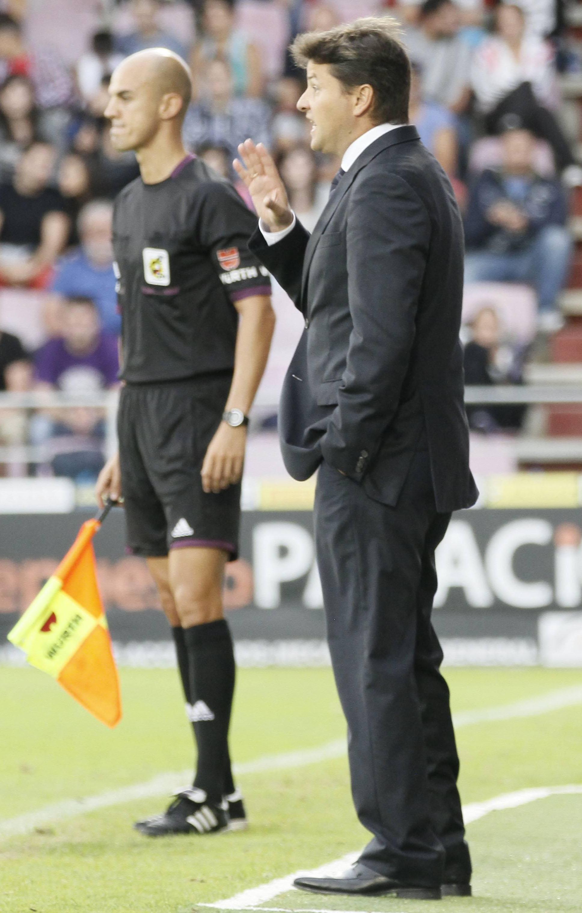 Ricardo Rodríguez dirigiendo un partido de fútbol.